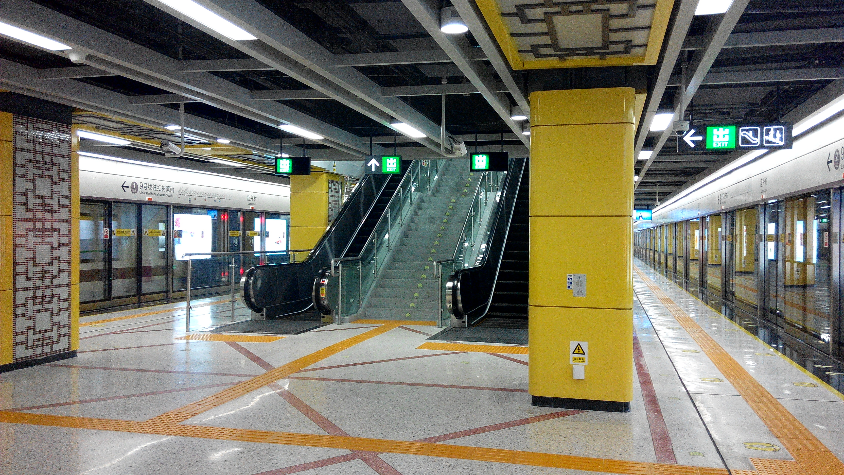 深圳地铁9号线 鹿丹村站站台